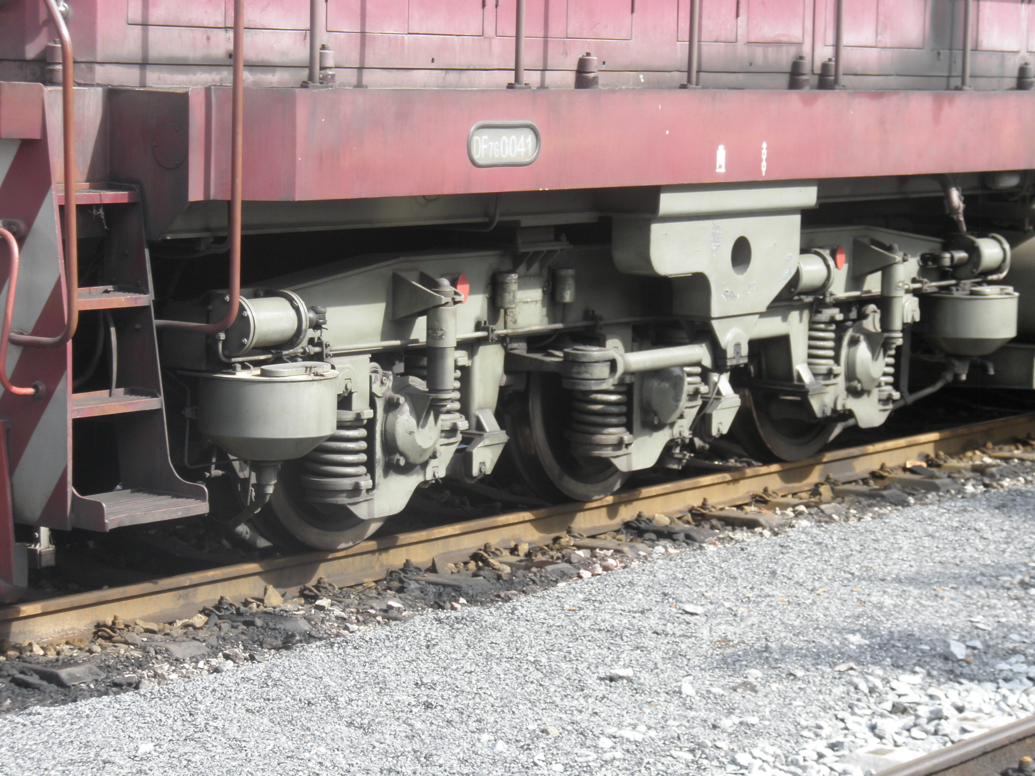 沿海公司DF7G0041 转向架